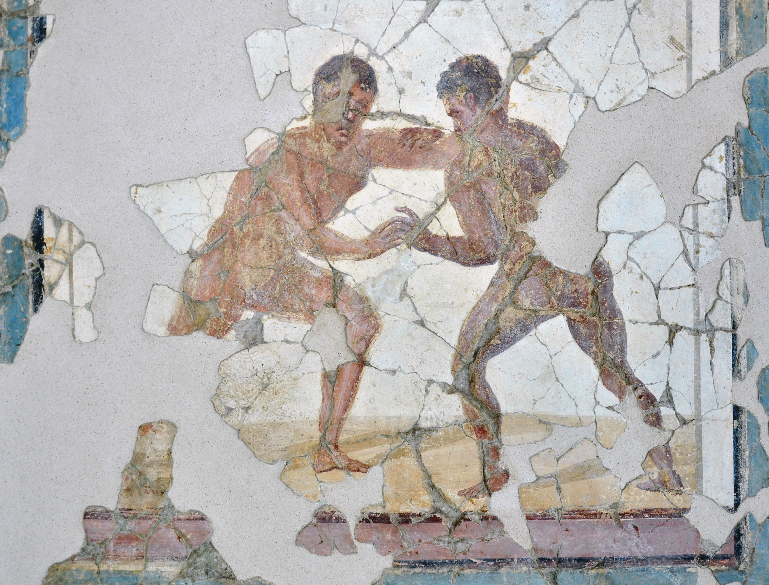 Lutteurs, peinture murale d'un ensemble représentant les jeux de la palestre, qui décorait les latrines des Thermes des Lutteurs. 3ème siècle, Vienna Allobrogum. Musée gallo-romain de Saint-Romain-en-Gal-Vienne.